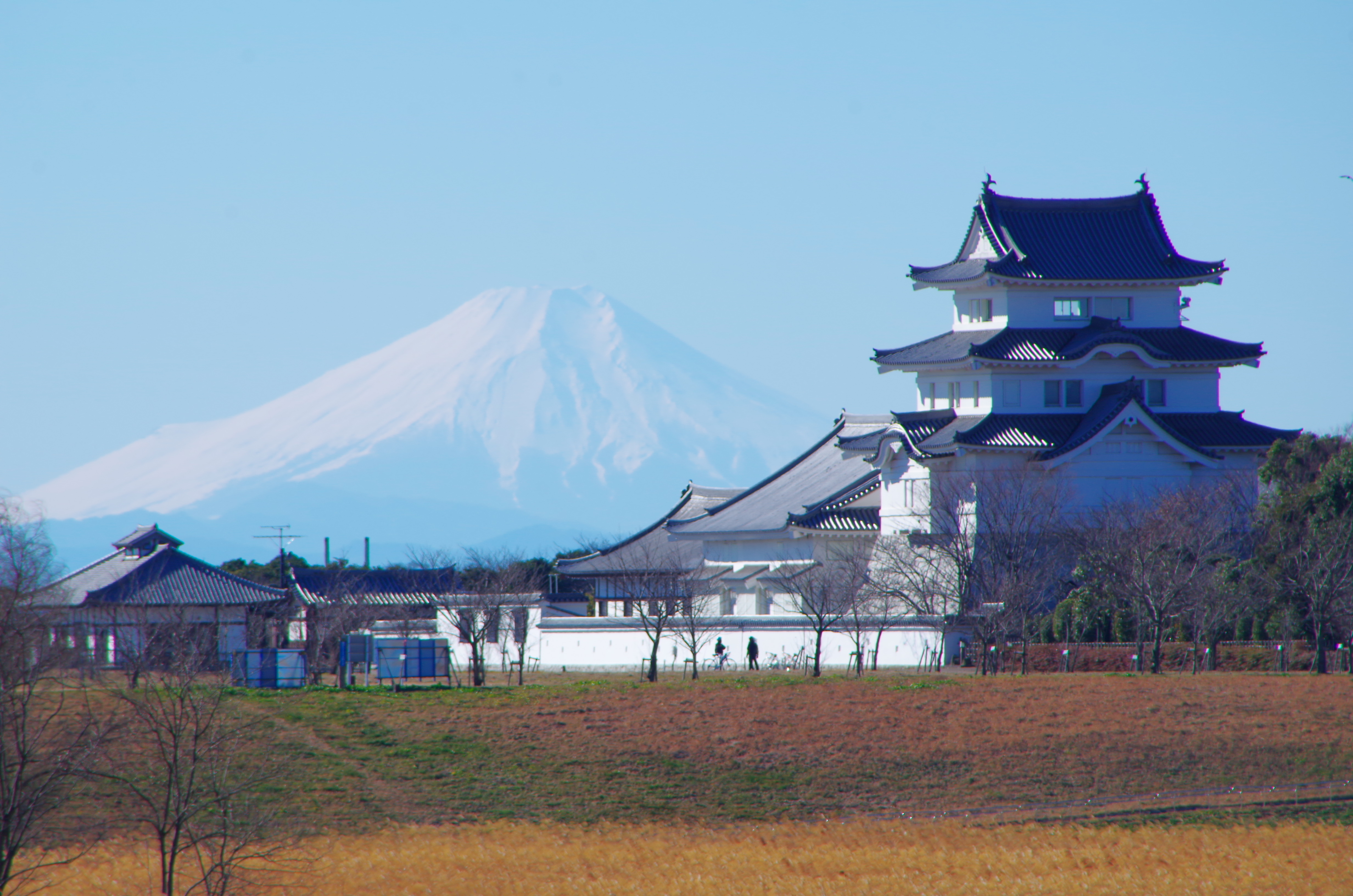 利根川堤防から関宿城を望む Sekiyado Castle and Mt. Fuji 2015.1.03